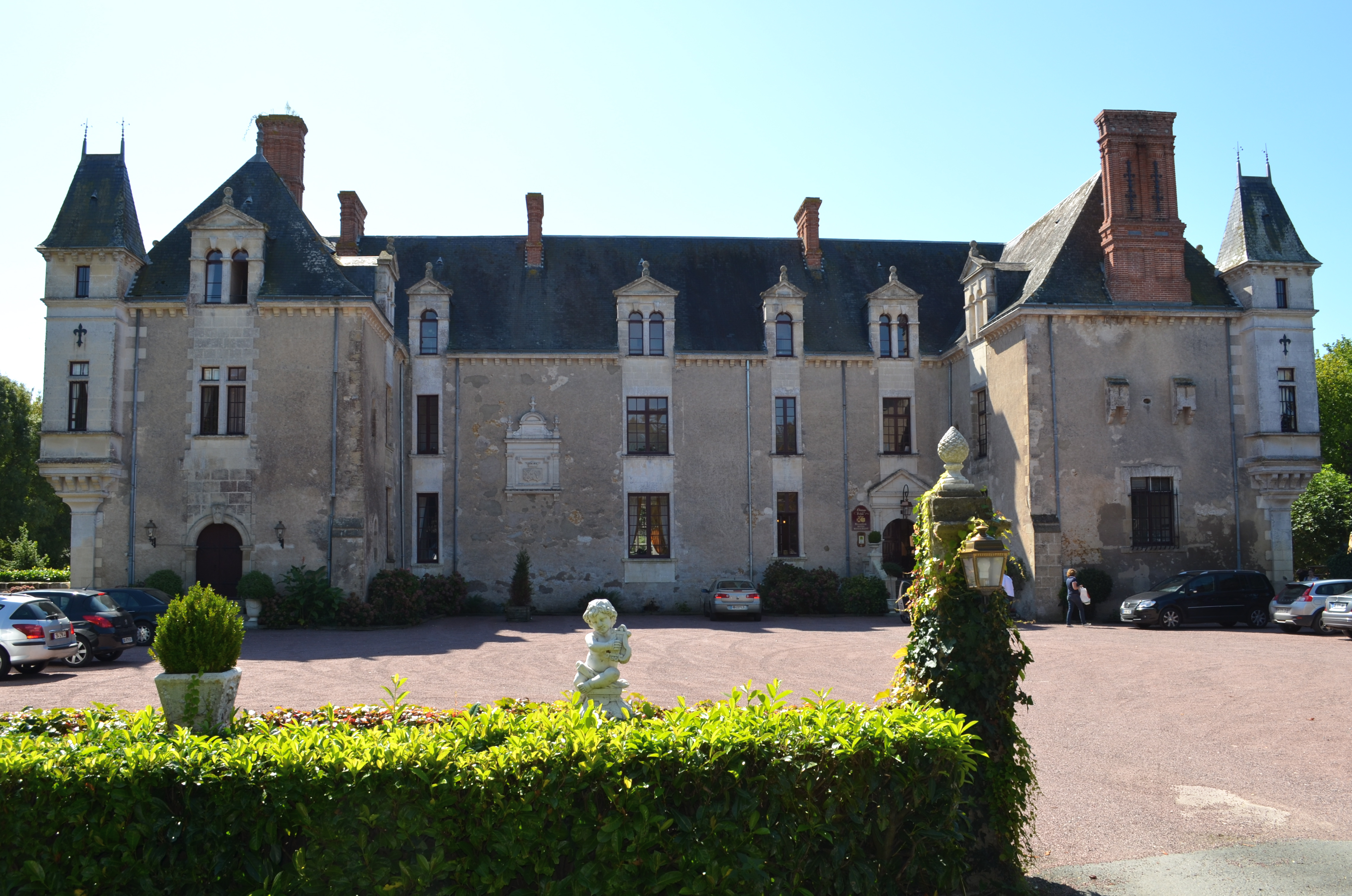 Logis de la Vérie - Challans (Vendée) .